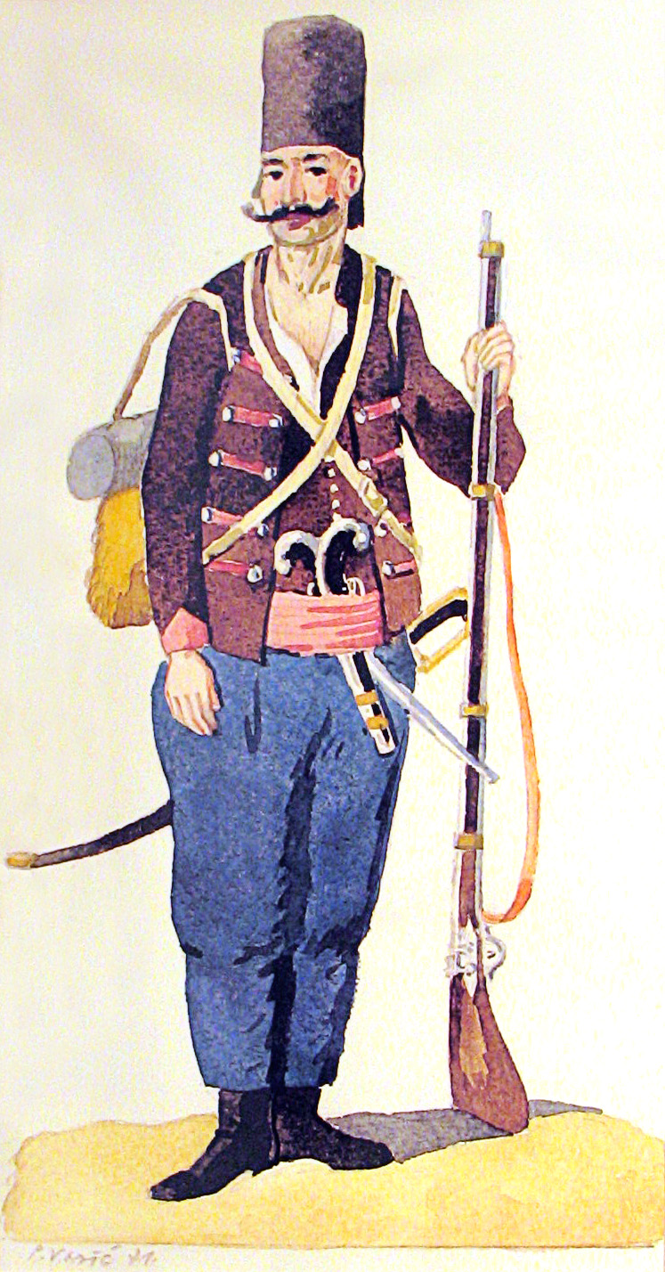 Добровољац Михаљевићевог српског фрајкора (реконструкција по Павлу Васићу, Музеј првог српског устанка) Фото: Михаило Грбић (21.10.2006, Орашац)